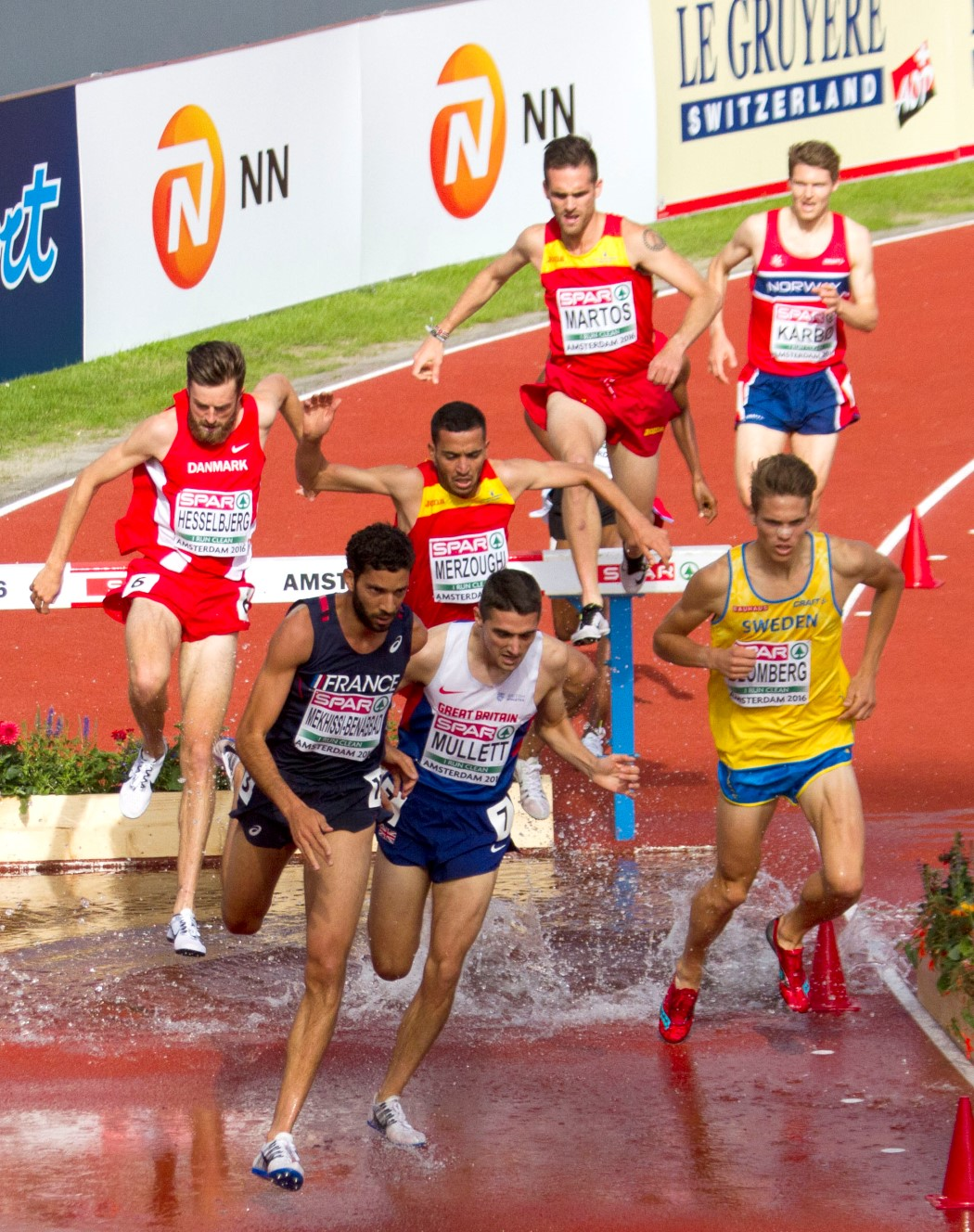 0184 steeple reeksen mekhissi